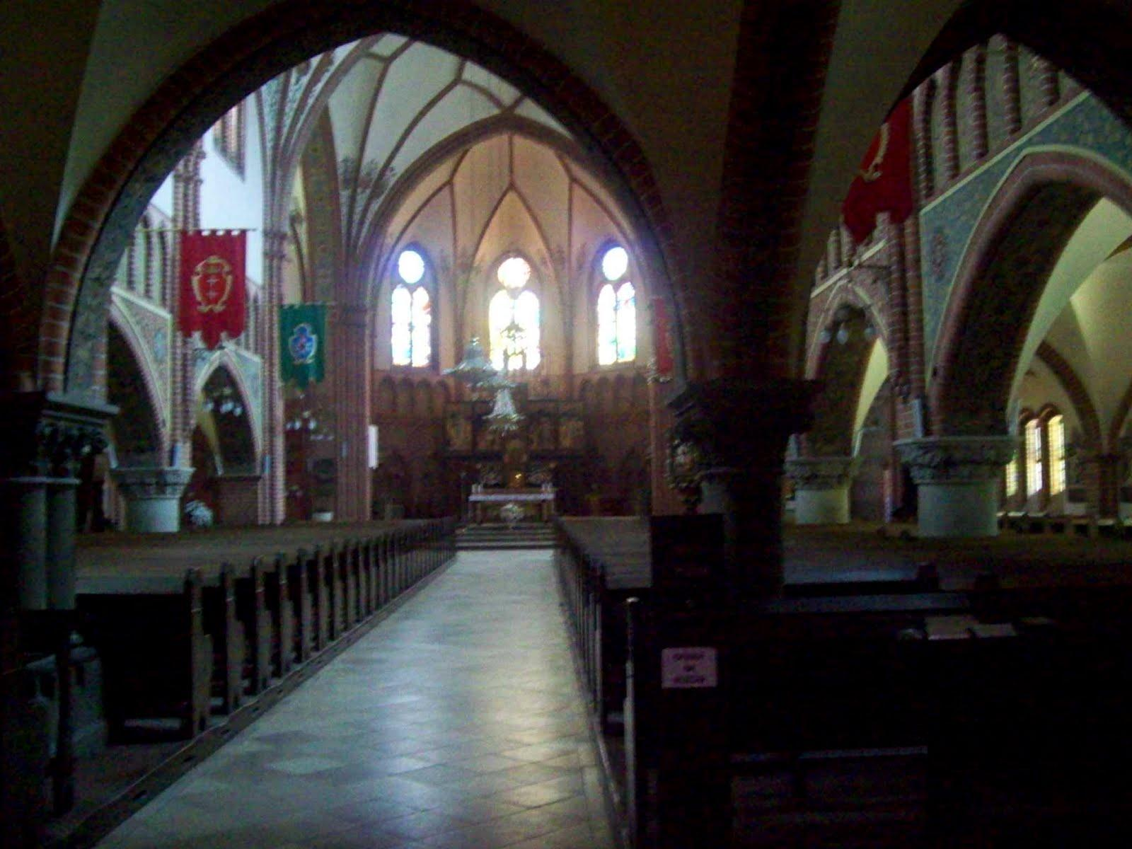 Collegiate church of Gdańsk Wrzeszcz.